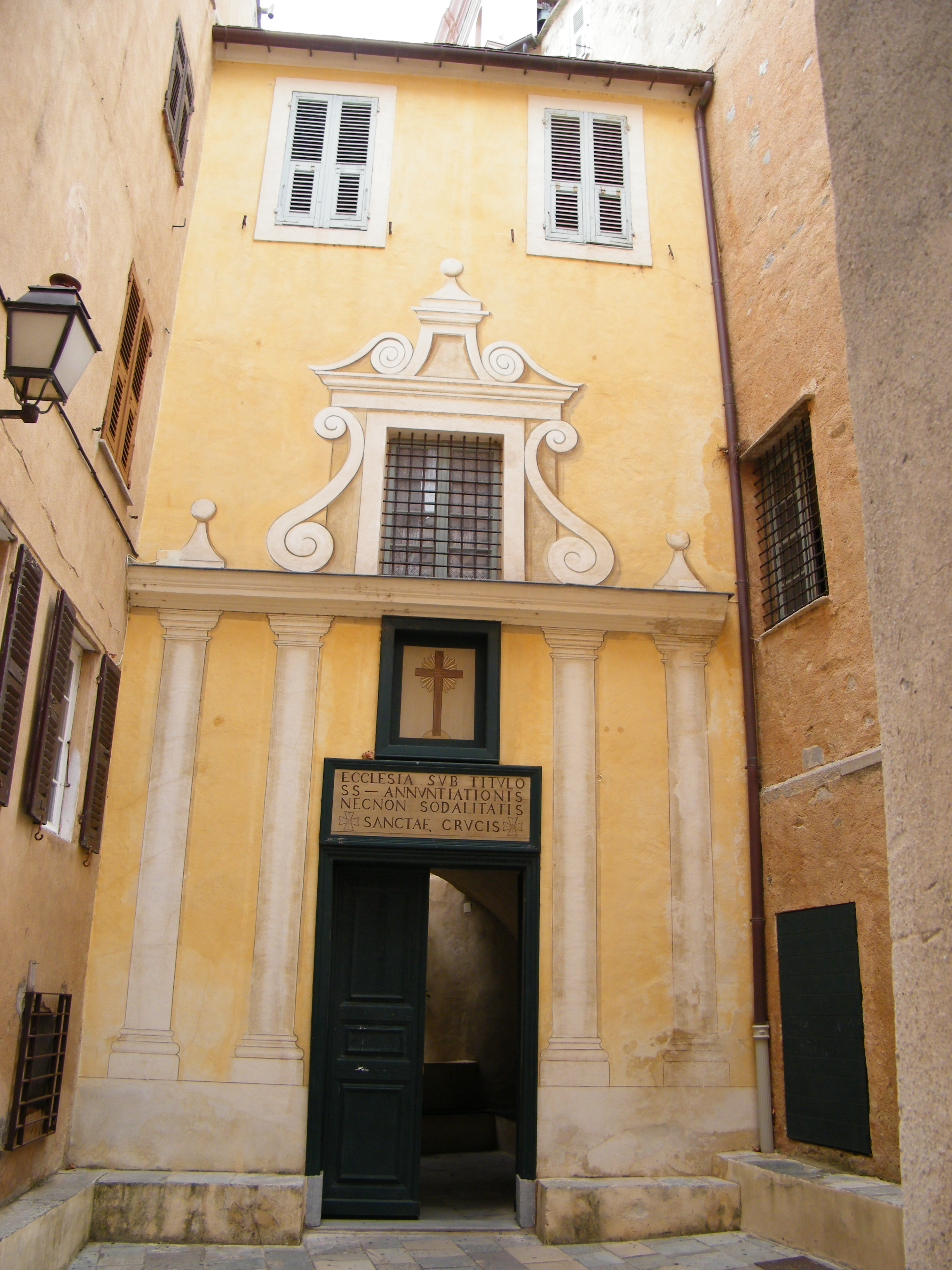 Église Sainte-Croix, (Classé, 1931) .